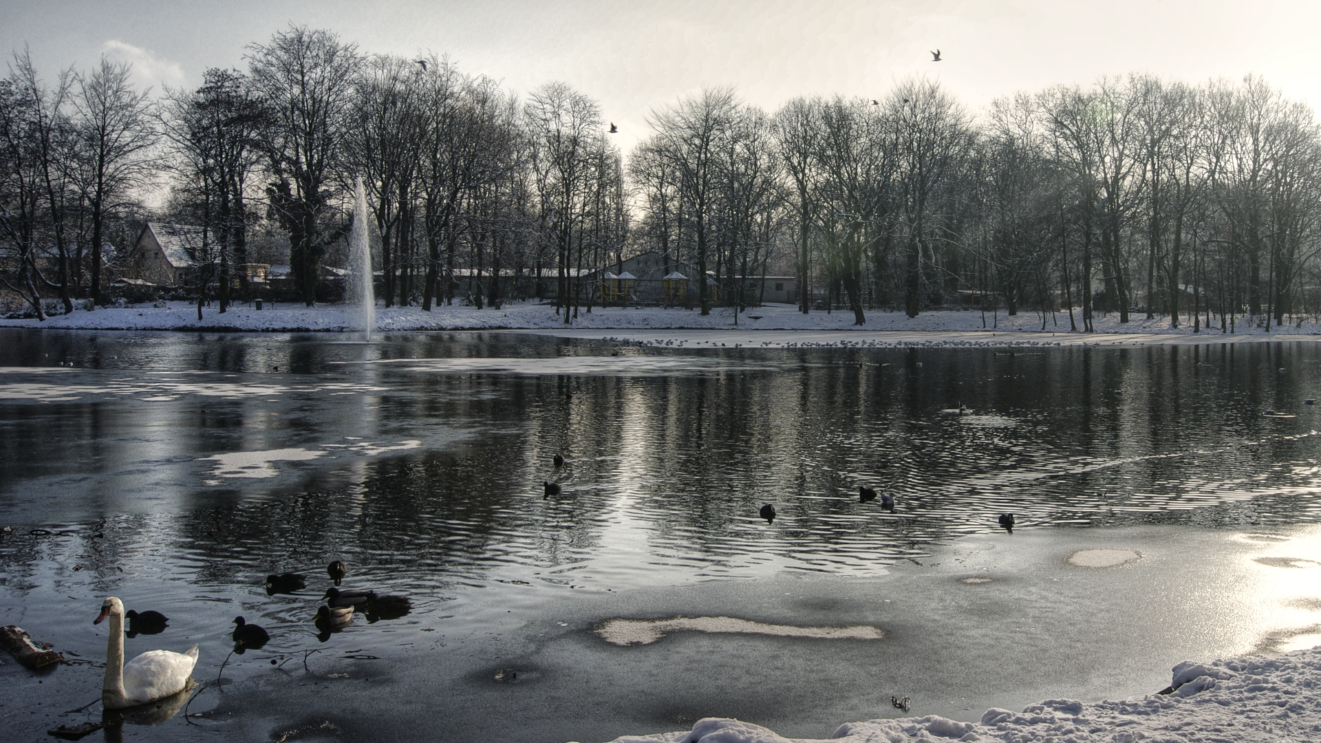 Kaisergarten, Oberhausen, Germany